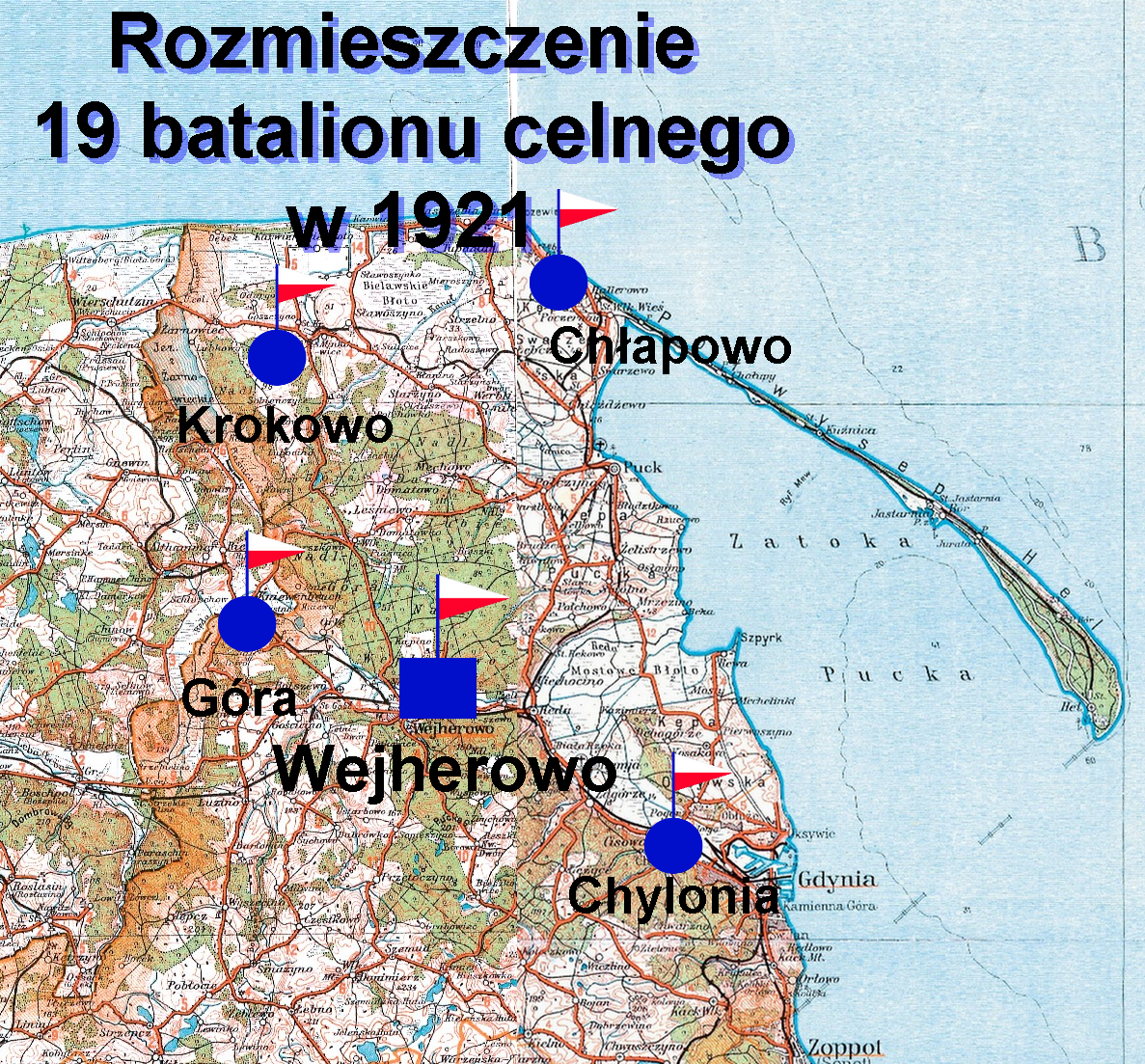 Rozmieszczenie 19 batalionu celnego w 1921 roku